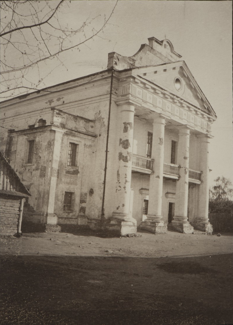 Беларуская (тарашкевіца): Шарашоў (Šarašoŭ). Сынагога